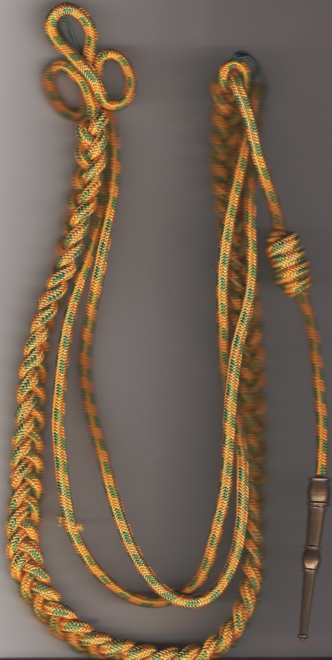 Description fourragère aux couleurs de la médaille miltaire. Date1918Sourcefourragère personnelle (que j'ai porté en 1982)Authorfantassin 72Permission (Reusing this file) libre de droits fourragère aux couleurs de la médaille miltaire.